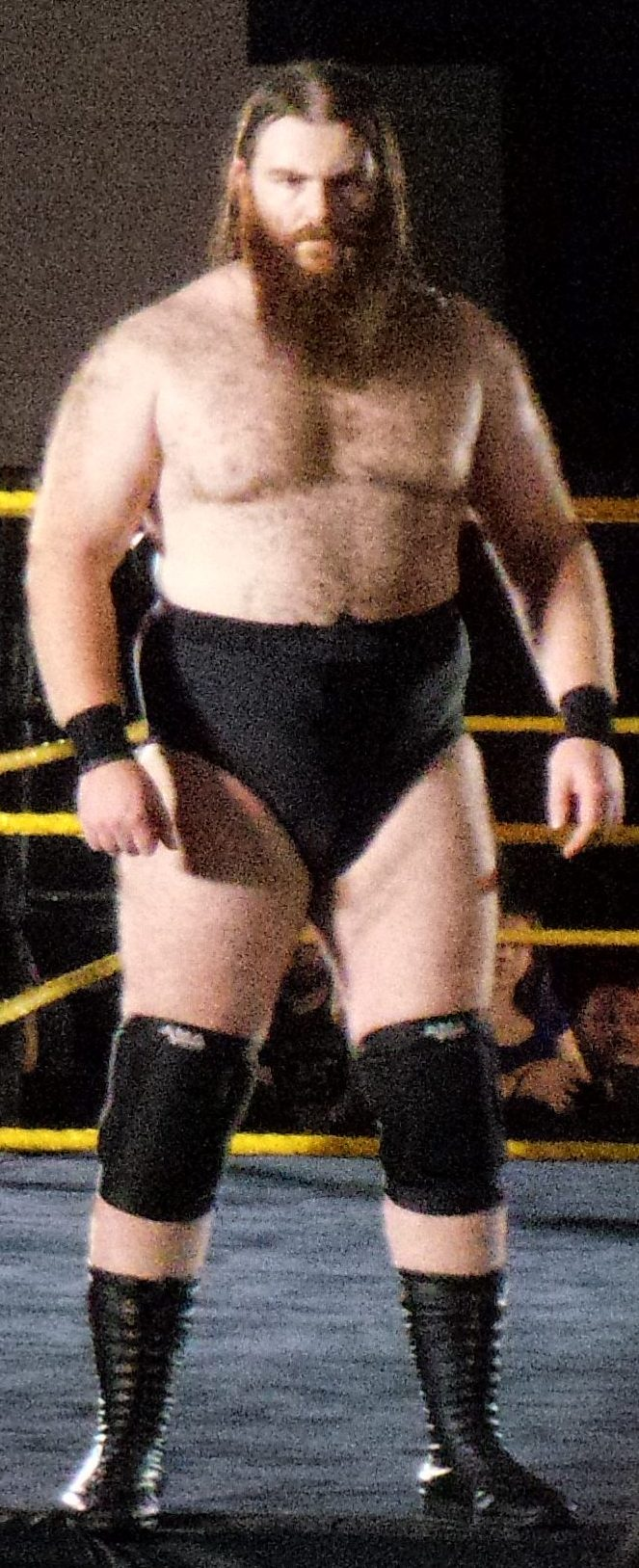 P_20170505_212447_003